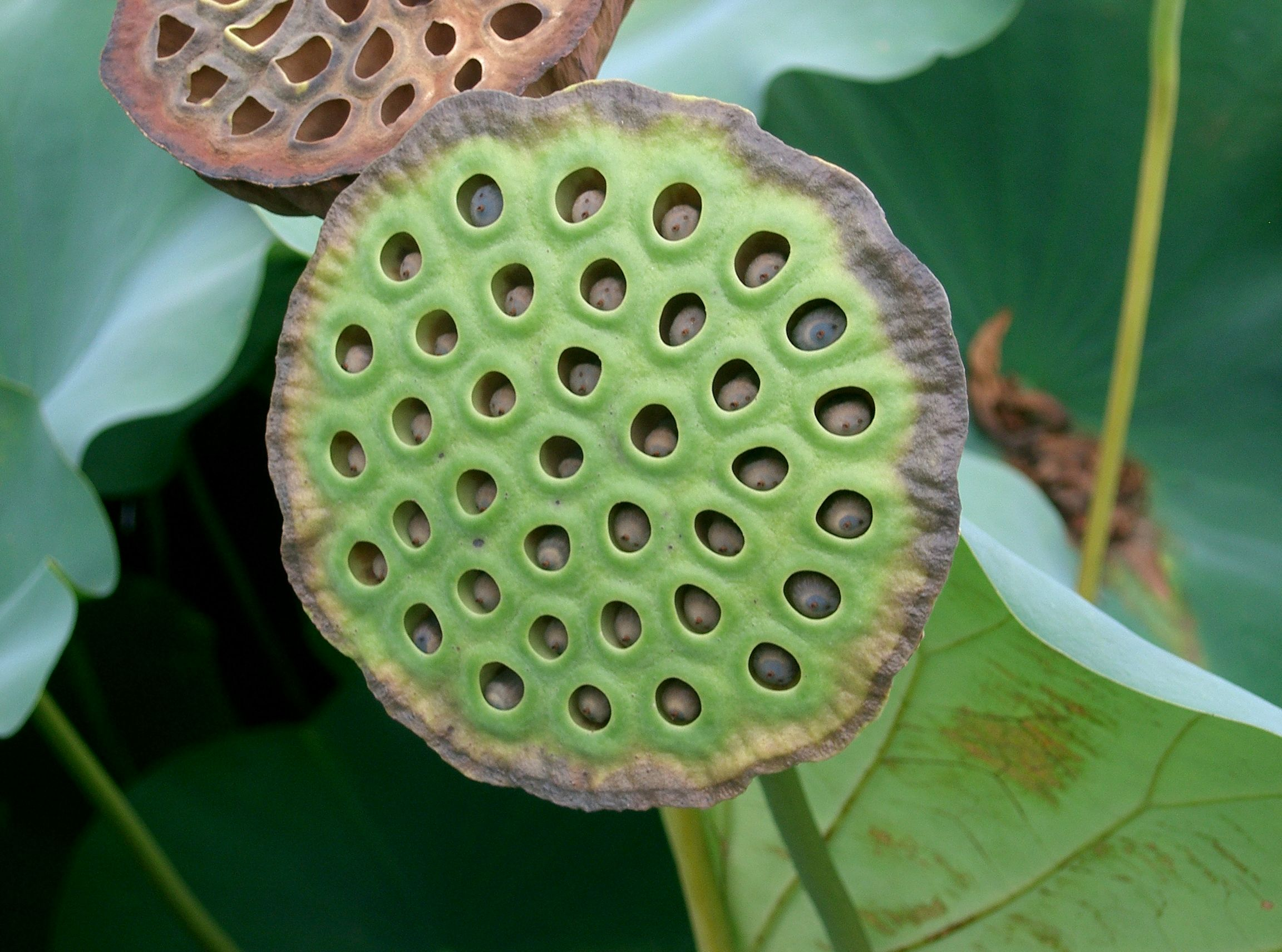 Nelumbo nucifera